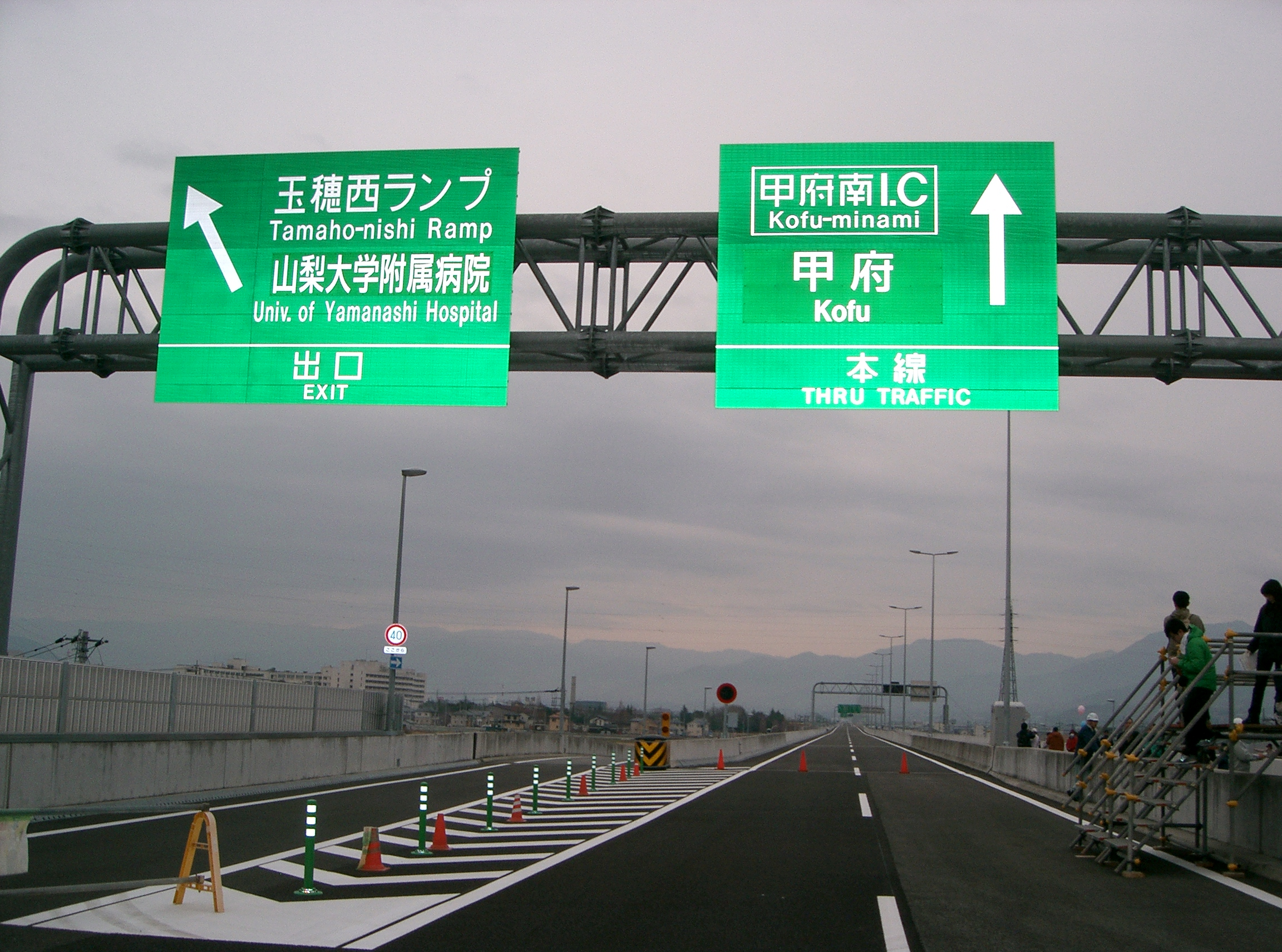 新山梨環状道路南部区間 内廻り玉穂西ランプ